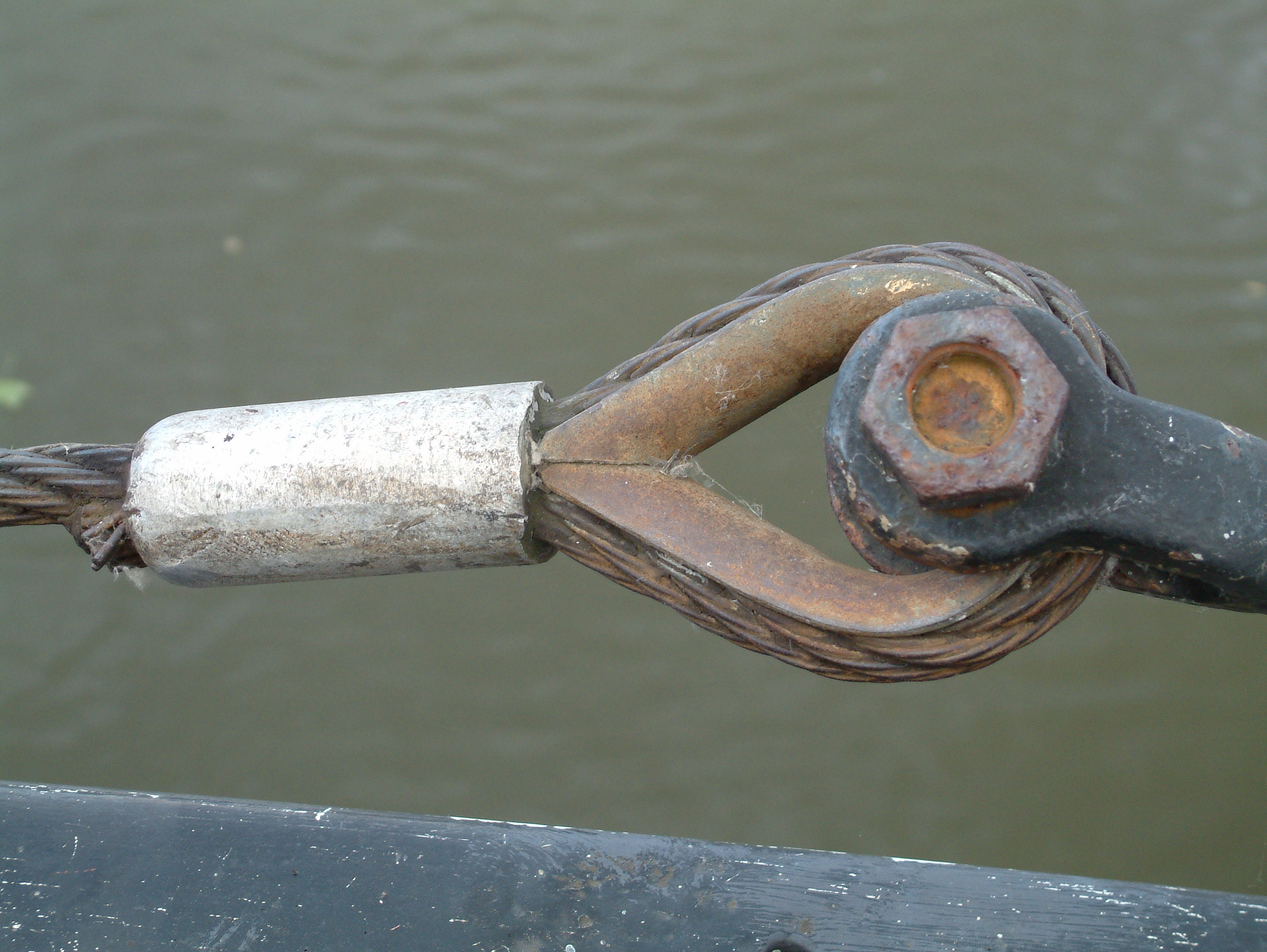 Staaldraadkous